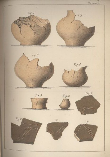 Illustration de poteries celtiques trouvées dans les sépultures celtiques de Court-St-Etienne